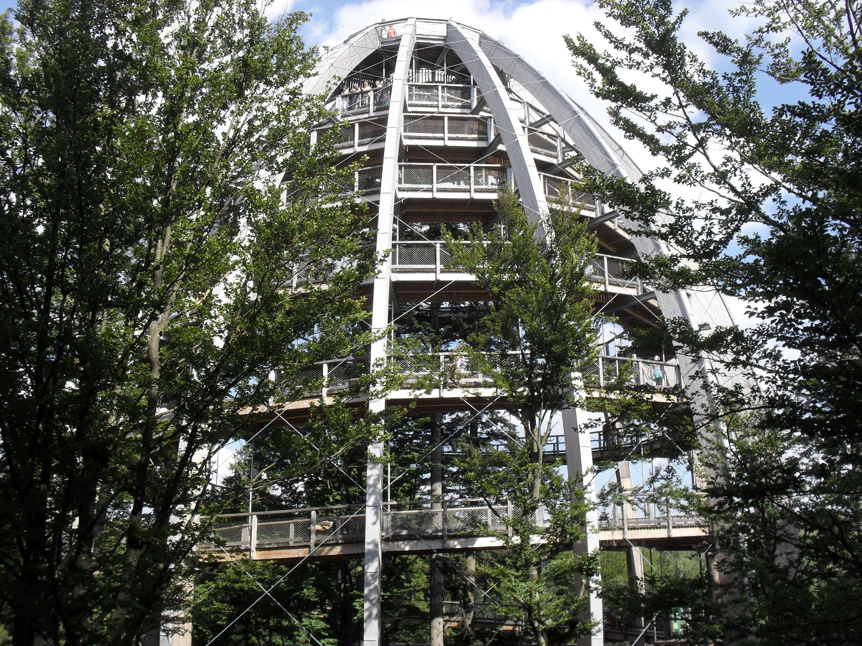 Baumwipfelpfad Neuschönau